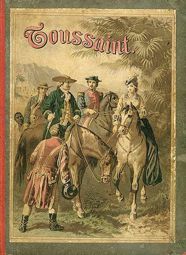 Von Gustav Bartsch gestalteter Buchdeckel von Toussaint, der Negerheld. Eine Erzählung für die reifere Jugend von Otto Hoffmann (nach Theodor Mügge. Mit 6 Farbendruckbildern nach Aquarellen von Gust. Bartsch. Zweite Auflage. Stuttgart, Julius Hoffmann. (K. Thiemanns Verlag). (1876). Die erste Auflage ist 1874 erschienen.